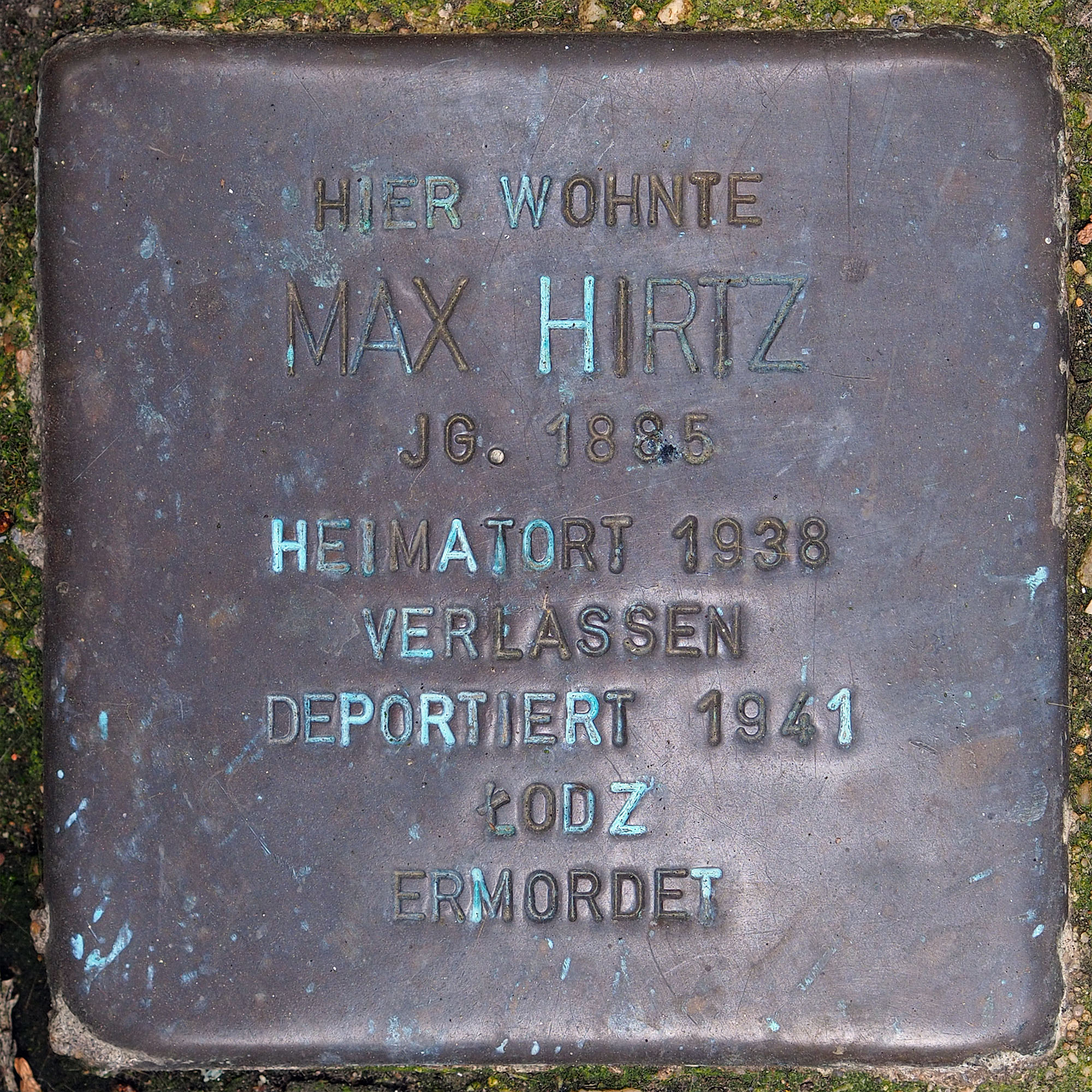 Stolpersteine GV: Hirtz, Max